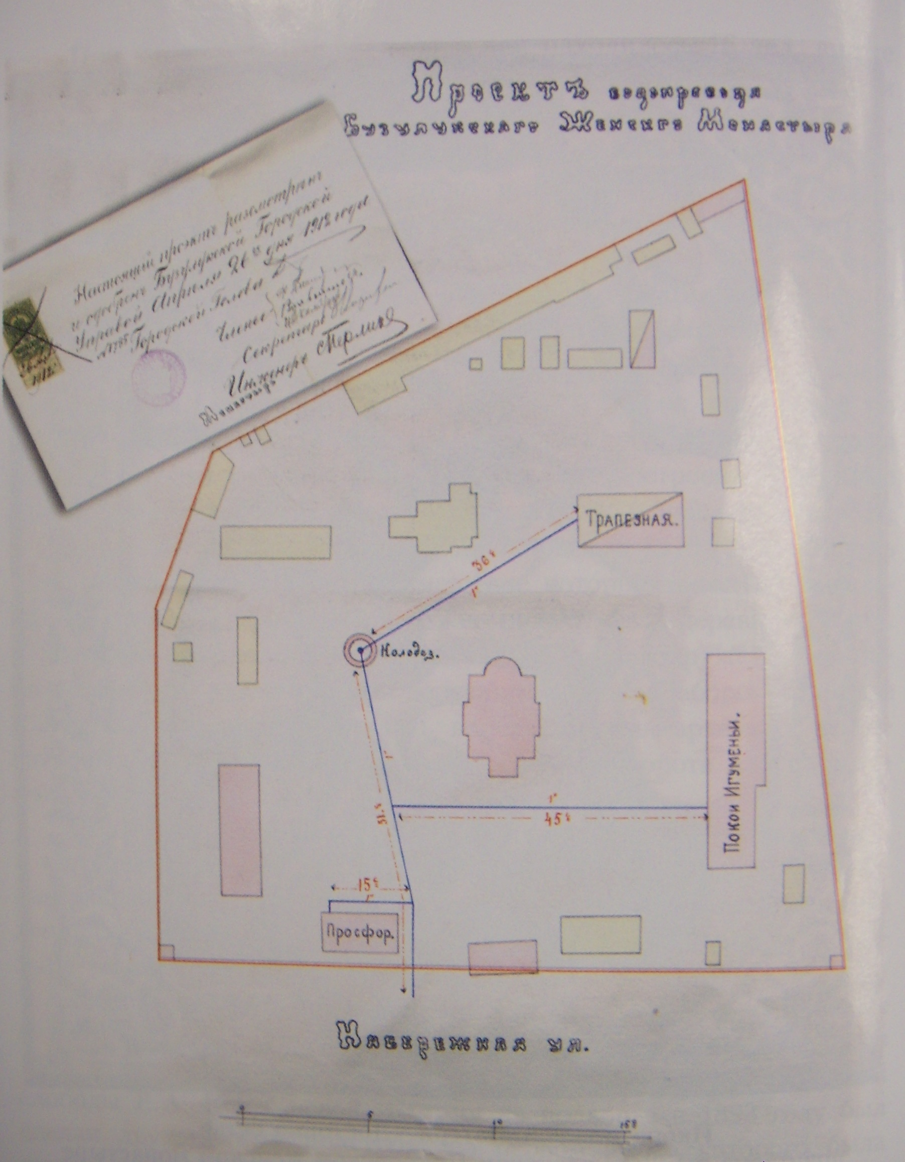 План строительство водопровода в Бузулукском Тихвинском Богородицком женском монастыре